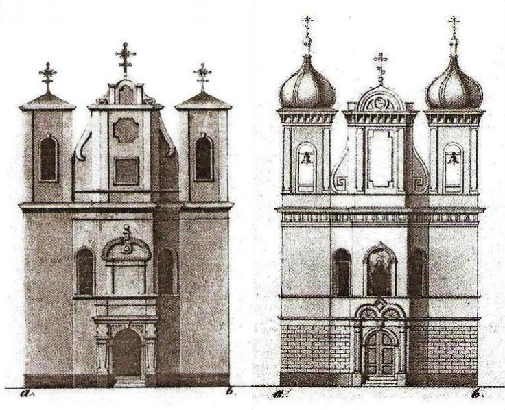 Беларуская (тарашкевіца): Маскалізацыя (русіфікацыя) Вялікага Княства Літоўскага. Места Вільня. Касьцёл Найсьвяцейшай Тройцы, помнік архітэктуры барока: аўтэнтычны выгляд (налева) і па руйнаваньні ў выніку маскоўскай перабудовы (направа)